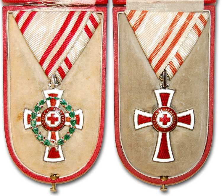 Osztrák Vöröskereszt II. osztályú Díszjelvénye hadiékítménnyel és annélkül